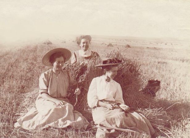 Loreto Iñiguez y MartaValdes